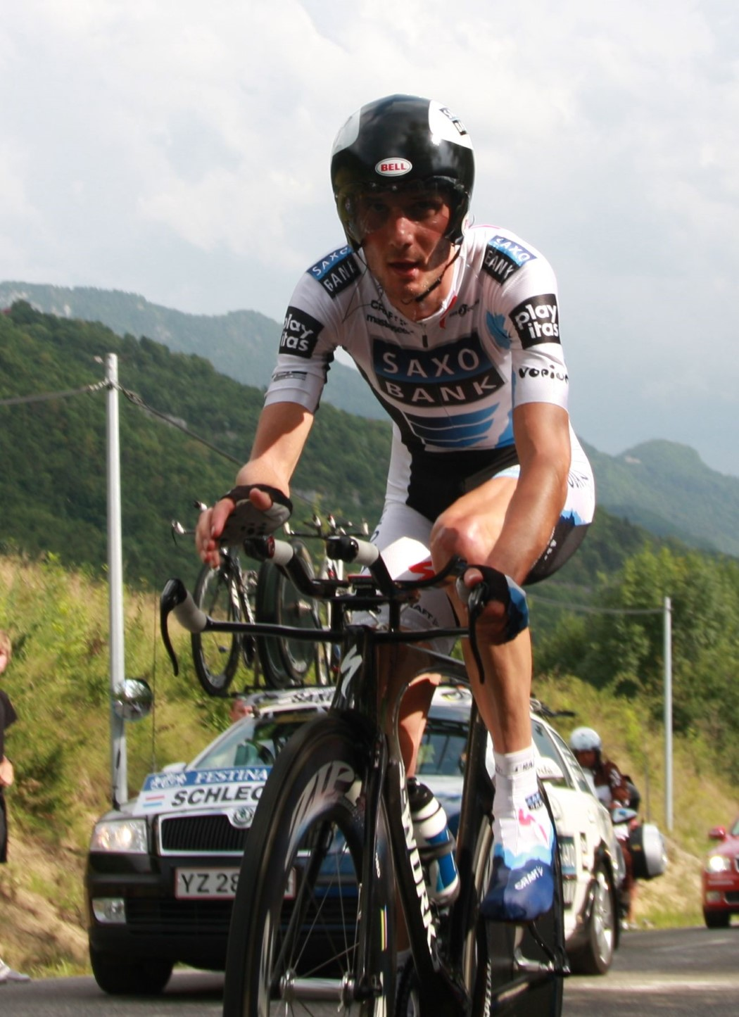 9181 frank